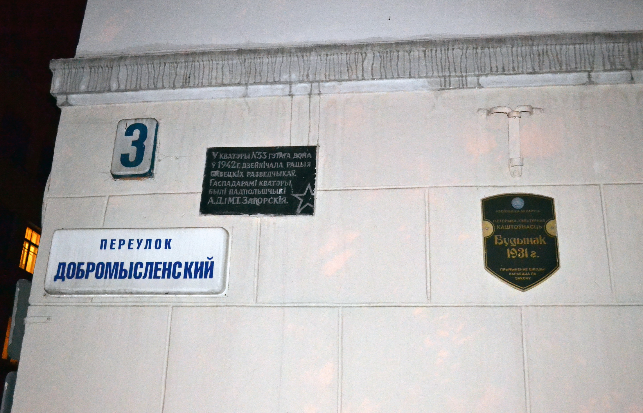 Беларуская (тарашкевіца): м. Менск, зав. Дабрамысьленскі, 3 This is a photo of Belarusian heritage monument. Reference number: невядомы ( WLM)